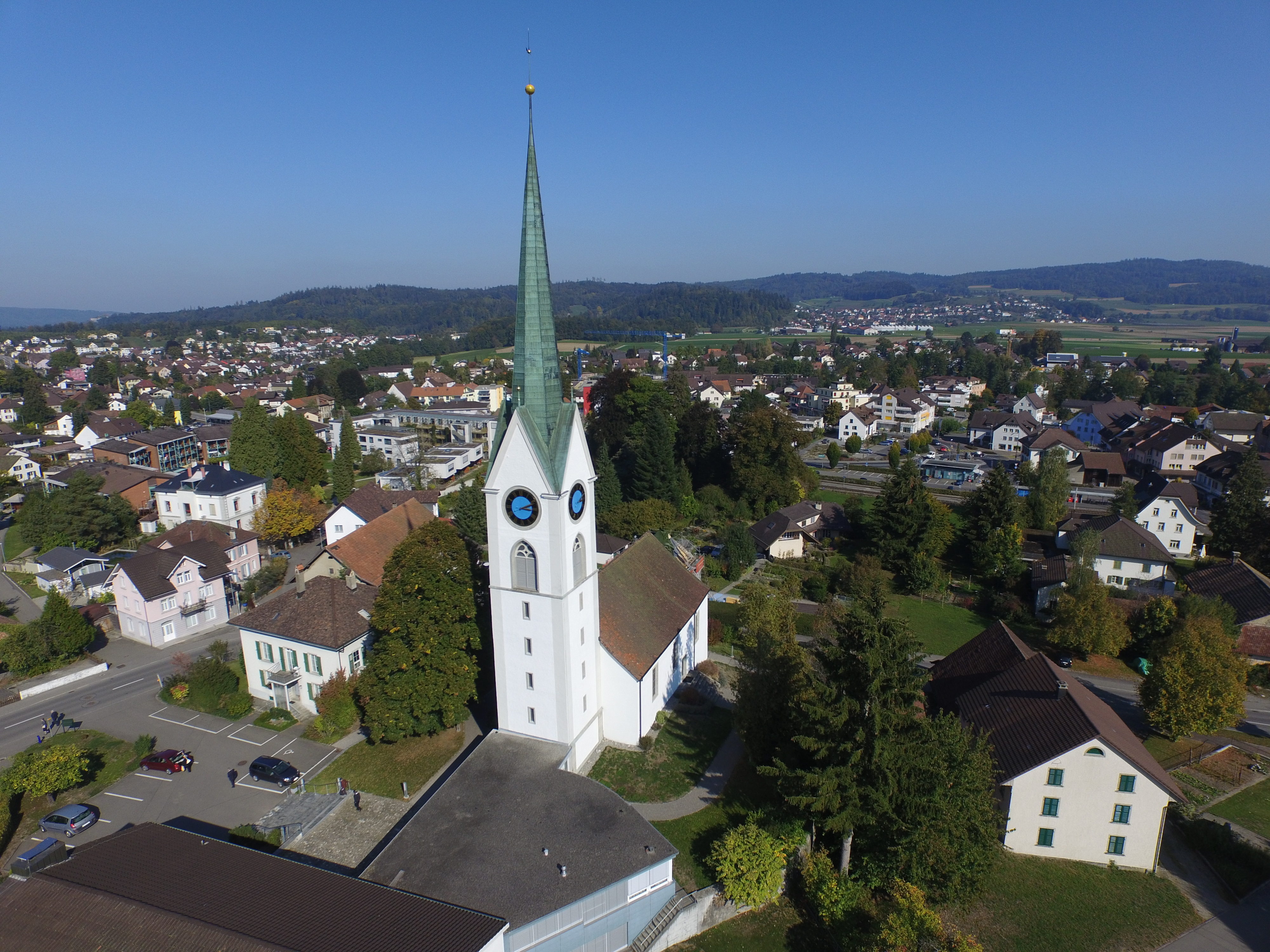 Reformierte Kirche Seon